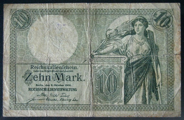 Kassenschein - 10 Mark - Deutsches Reich - 06.10.1906